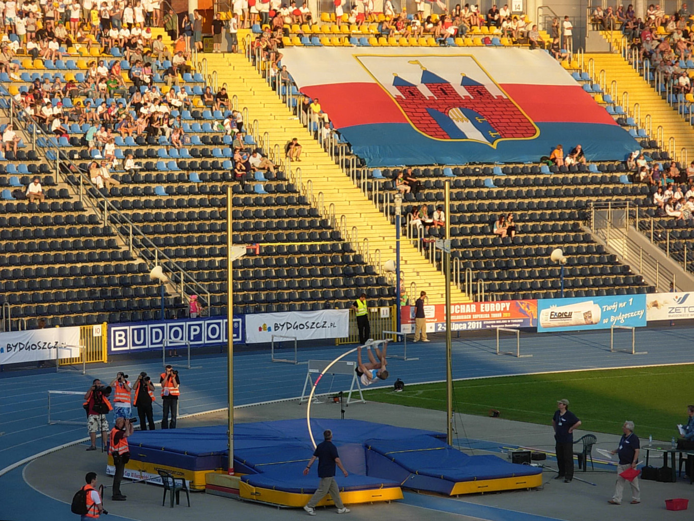 Miting lekkoatletyczny Enea Cup na stadionie Zawiszy Bydgoszcz w 2011 roku